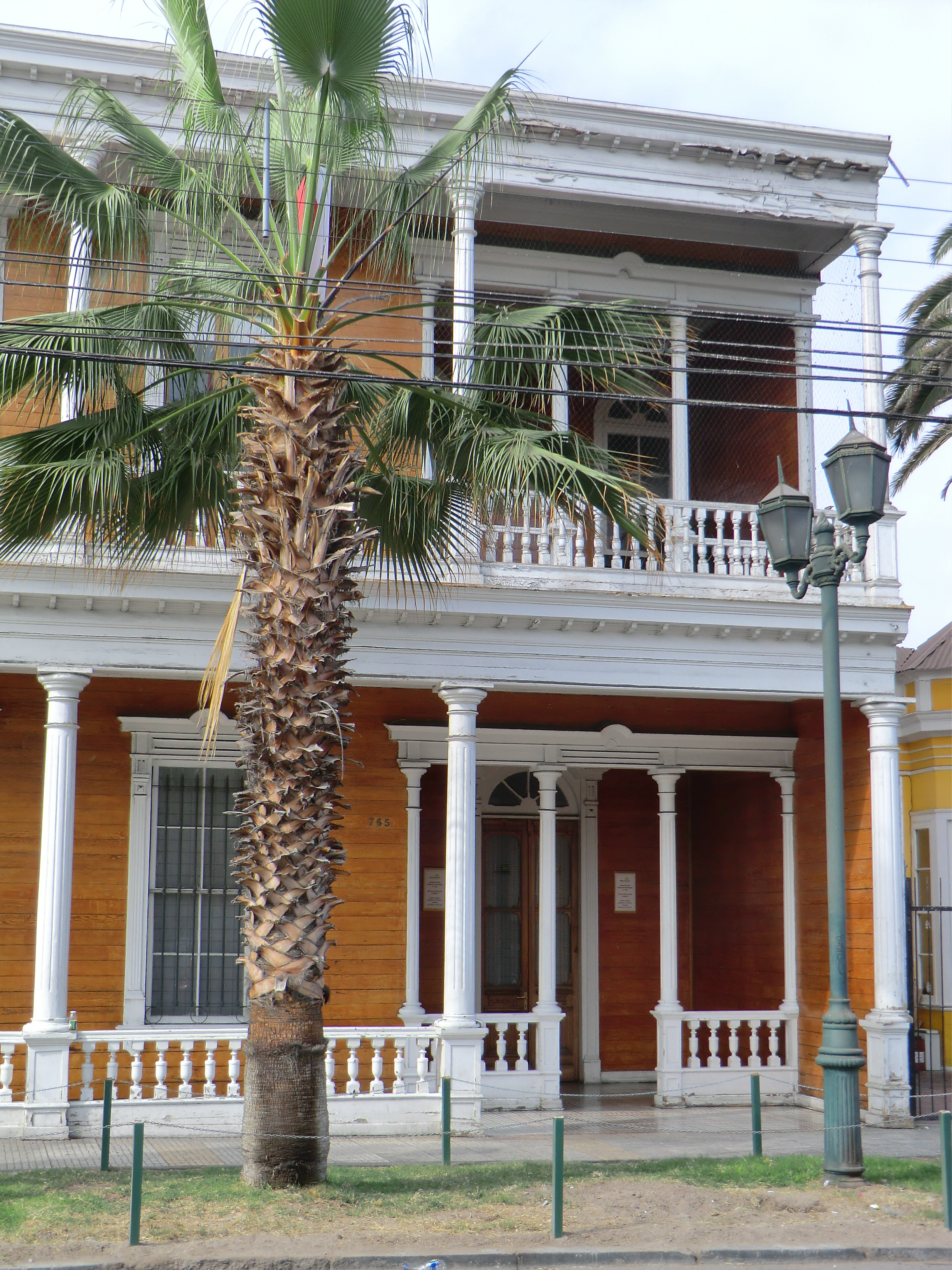 Actulamente Mutual de Seguridad, Iquique